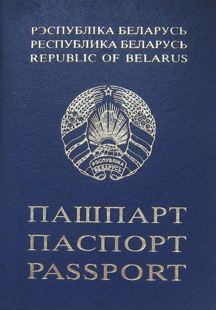 Пашпарт. Рэспубліка Беларусь. 2000, 2001, 2004, 2005, 2006 гады. Вокладка.